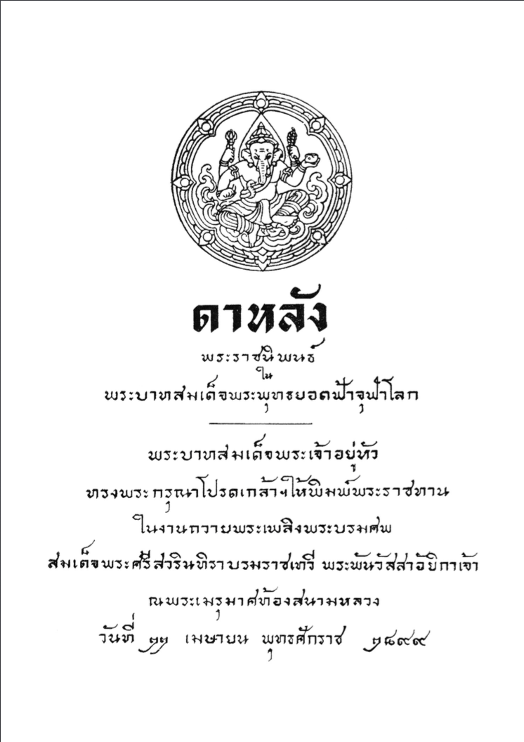 หน้าปกหนังสือดาหลัง พิมพ์พระราชทานในงานถวายพระเพลิงพระบรมศพสมเด็จพระพันวัสสาอัยิกาเจ้า